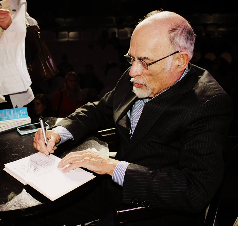 Ирвин Ялом. Москва 2014.